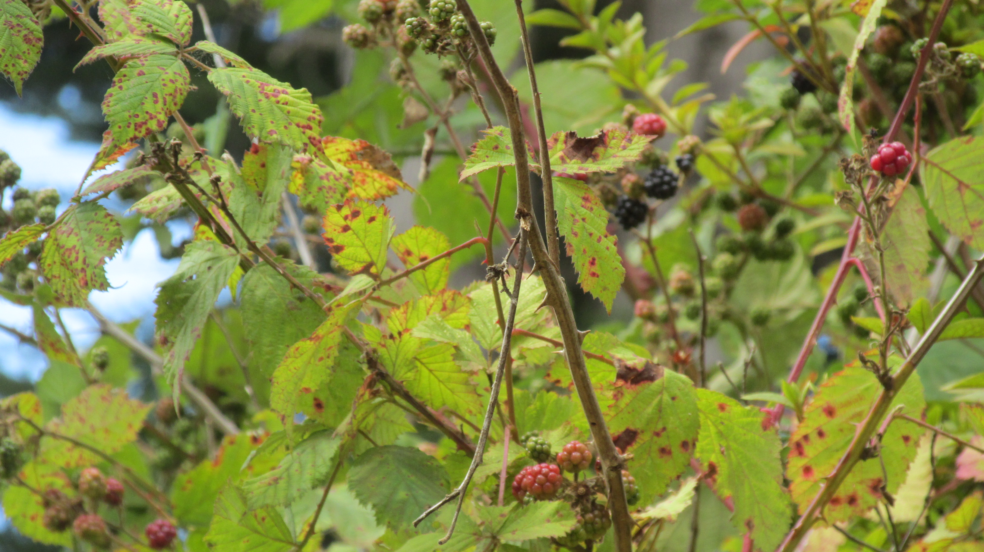 Moras